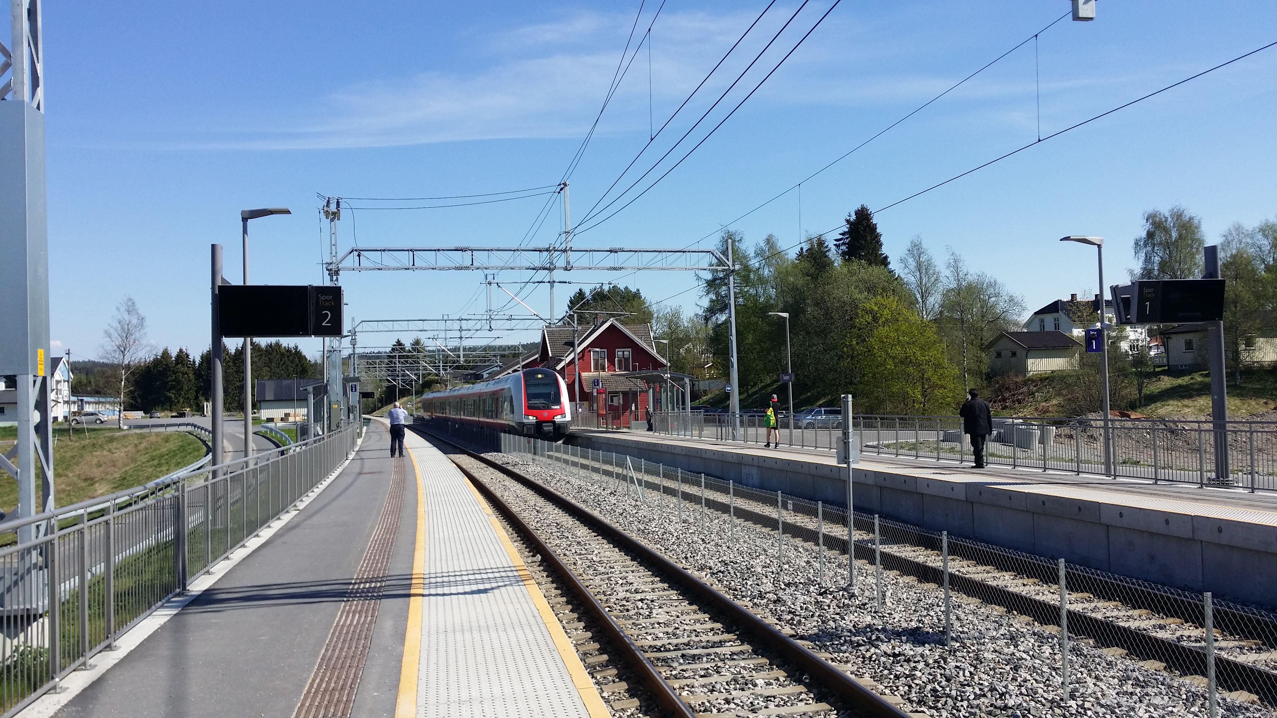 Tomter stasjon etter ombyggingen. Med tog.